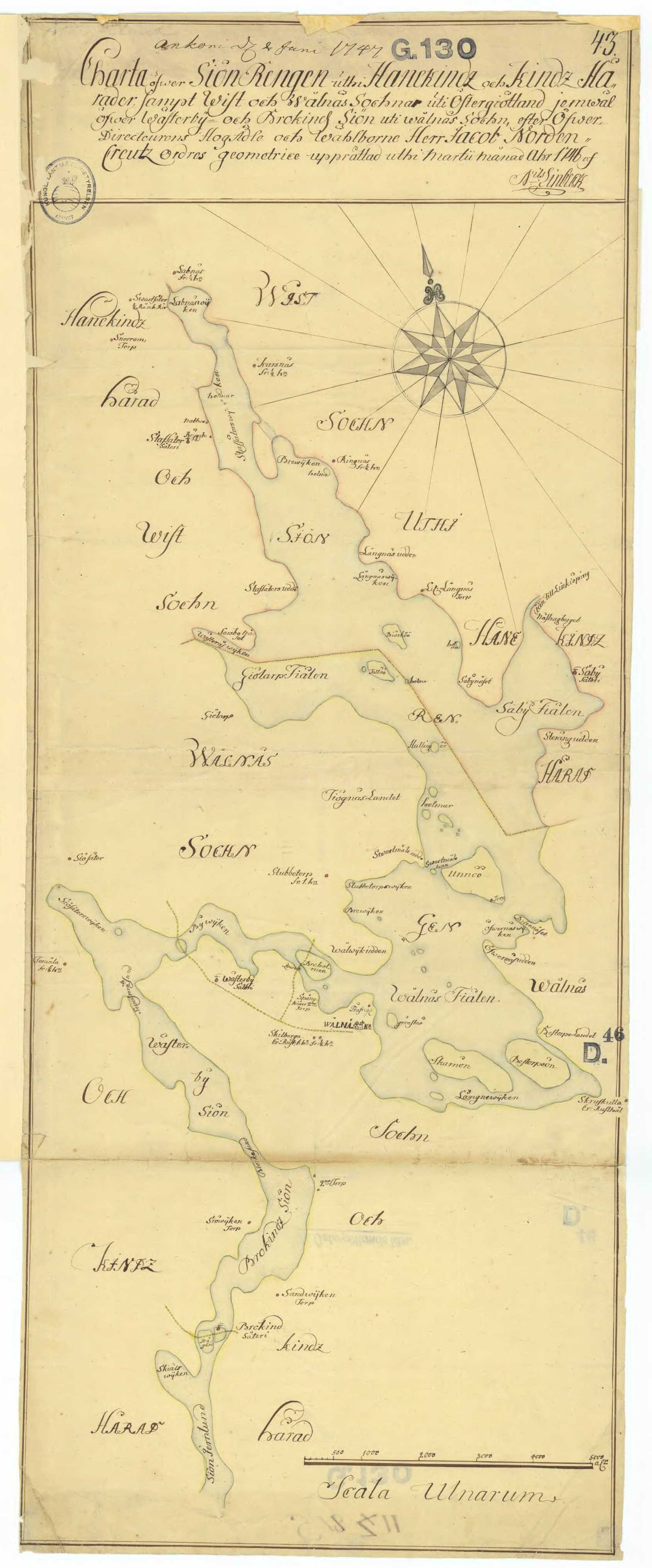 Karta över sjön Rängen av Nils Linbeck.